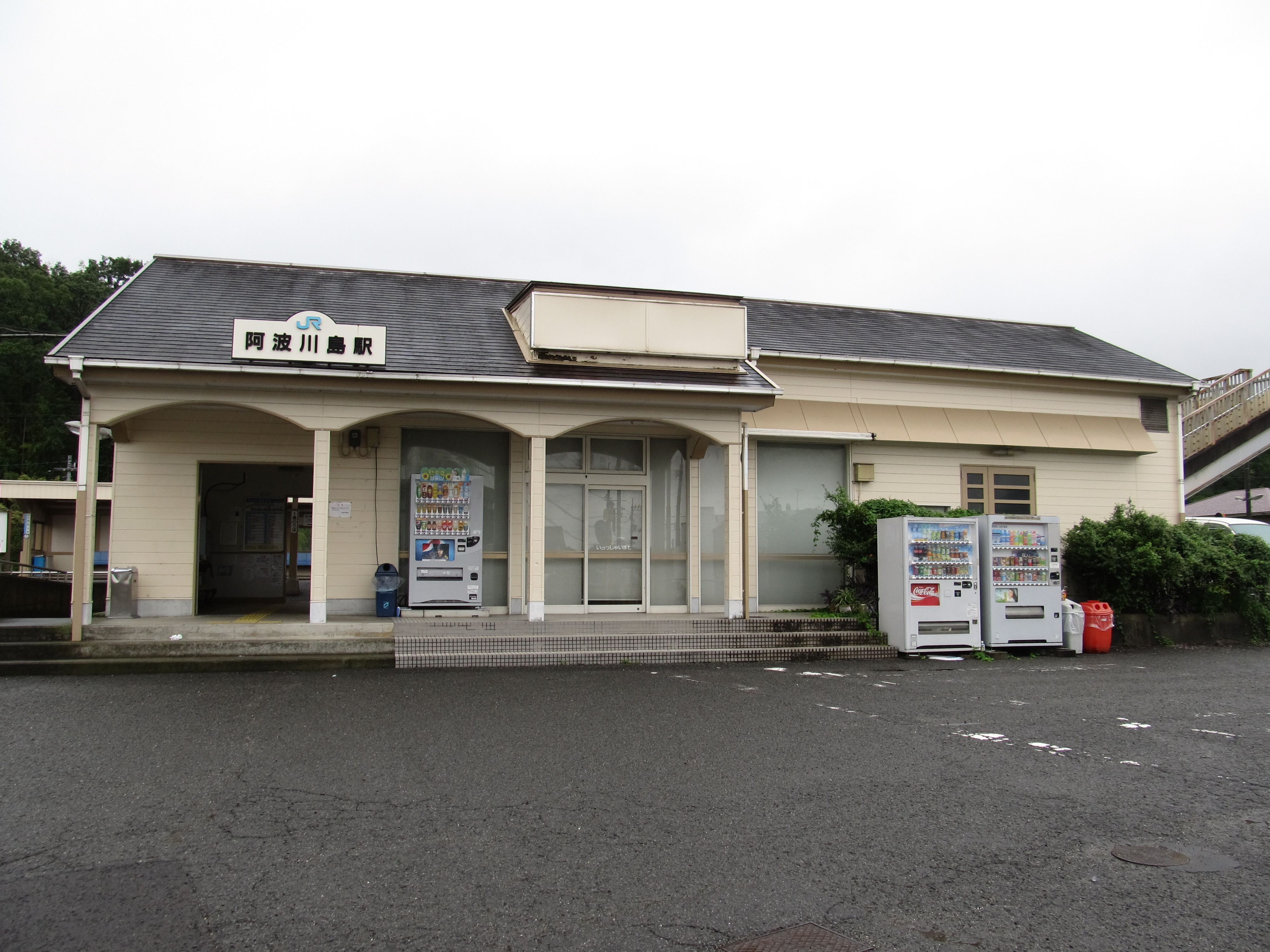 徳島県吉野川市川島町にある四国旅客鉄道（JR四国）徳島線阿波川島駅の駅舎。